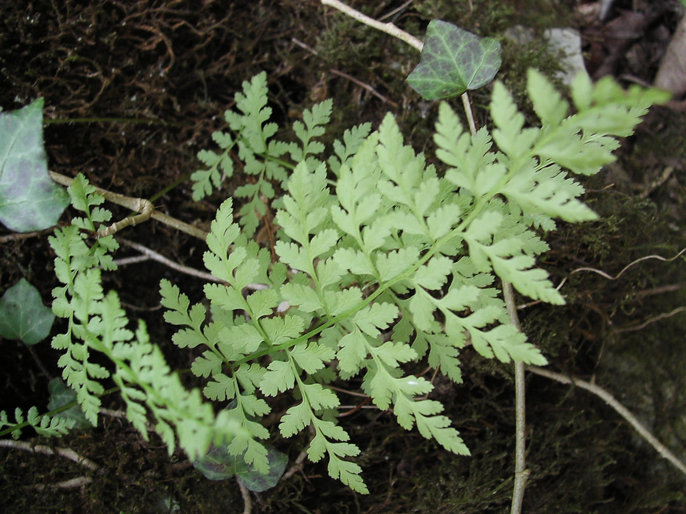 Cystopteris fragilis (syn. Cystopteris filix-fragilis, nom. inval.), Pont-à-Lesse (Namur), 14/04/2006 Author